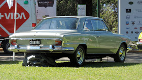 Torino 380 W 1967, un auto fabricado en Argentina en los años 60, y cuyo legado sigue vigente incluso hoy en dia